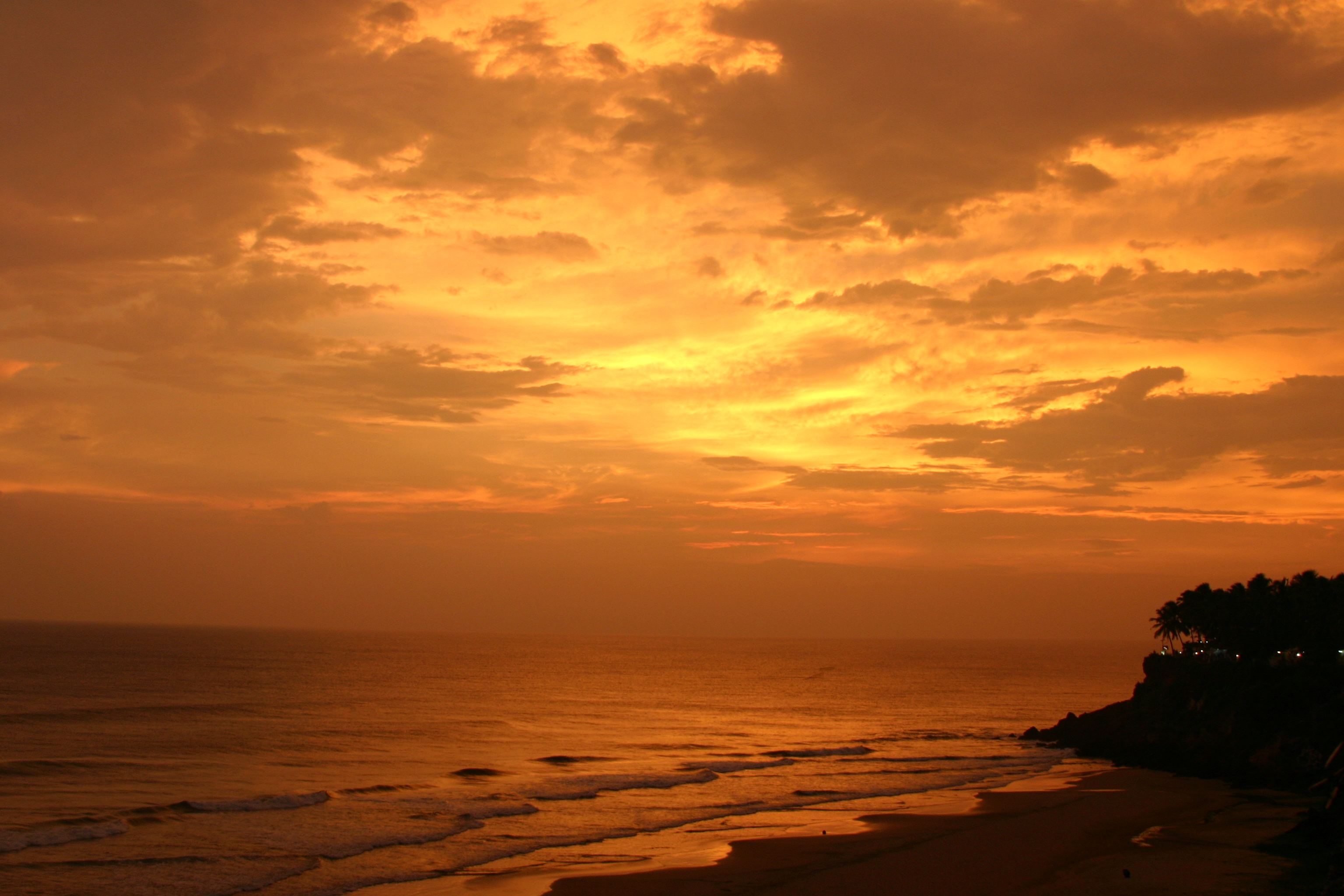 Varkala in Kerala. India.